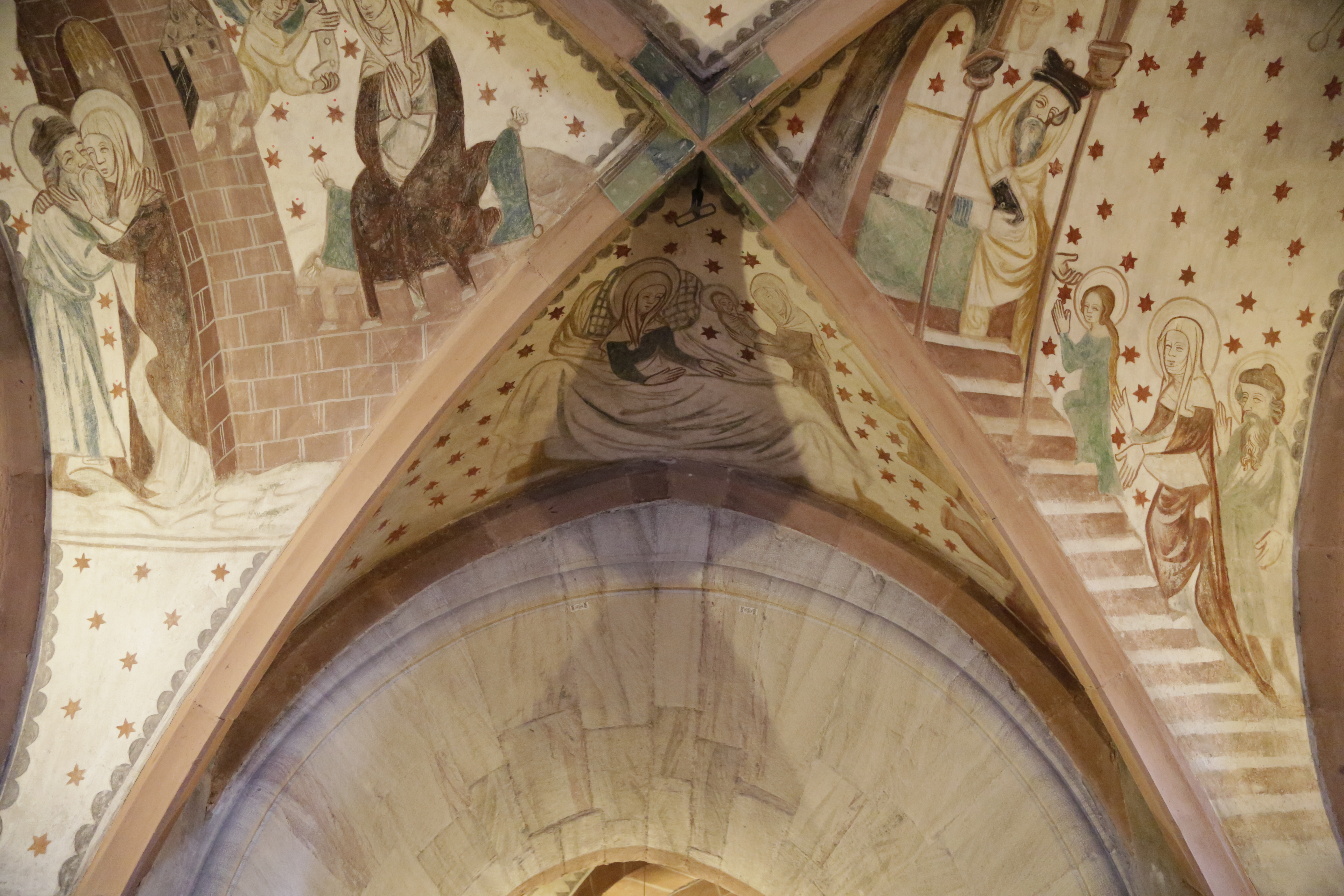 Bilder aus der Krypta des Basler Münster